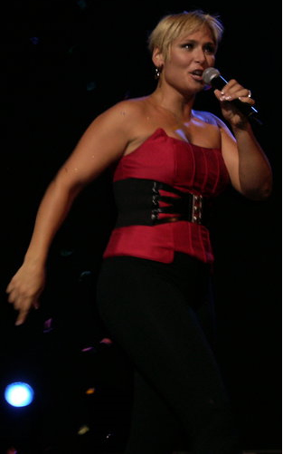 La cantante Rosa López en concierto. Durante el verano de 2010, de su propiedad de nadie tour.